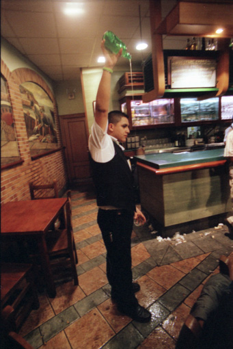 Escanciáu de sidra nún chigre